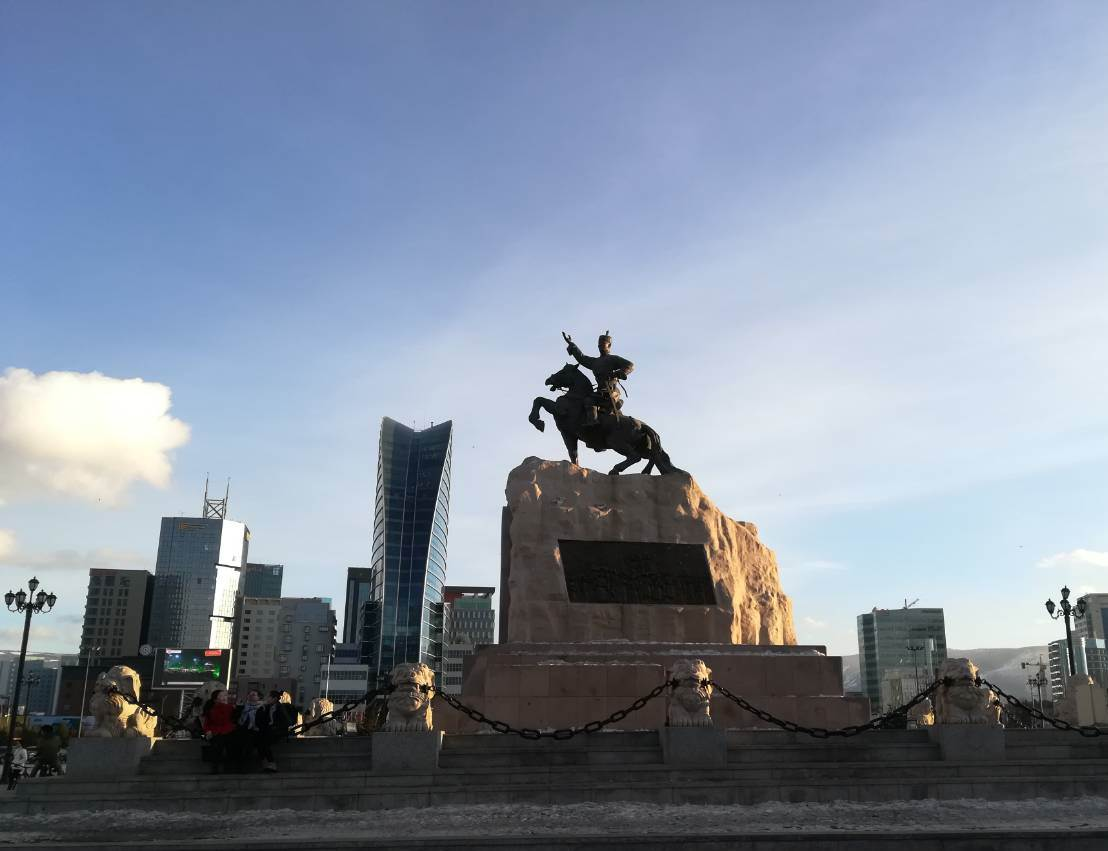 Monument to Sukhbaatar in Ulan Bator